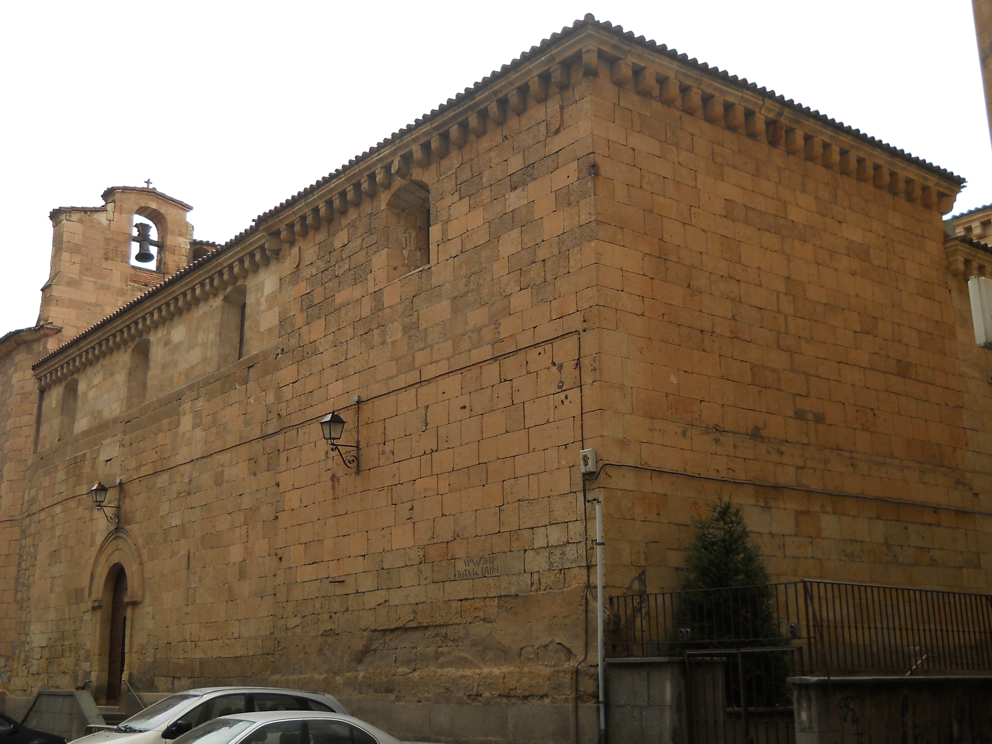 Monastero di Santa Isabella, Salamanca, Spagna